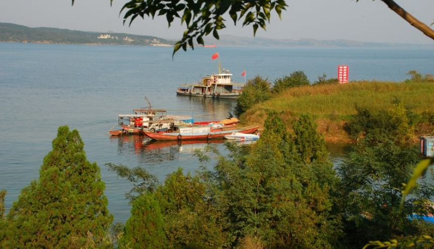 Dan river in China